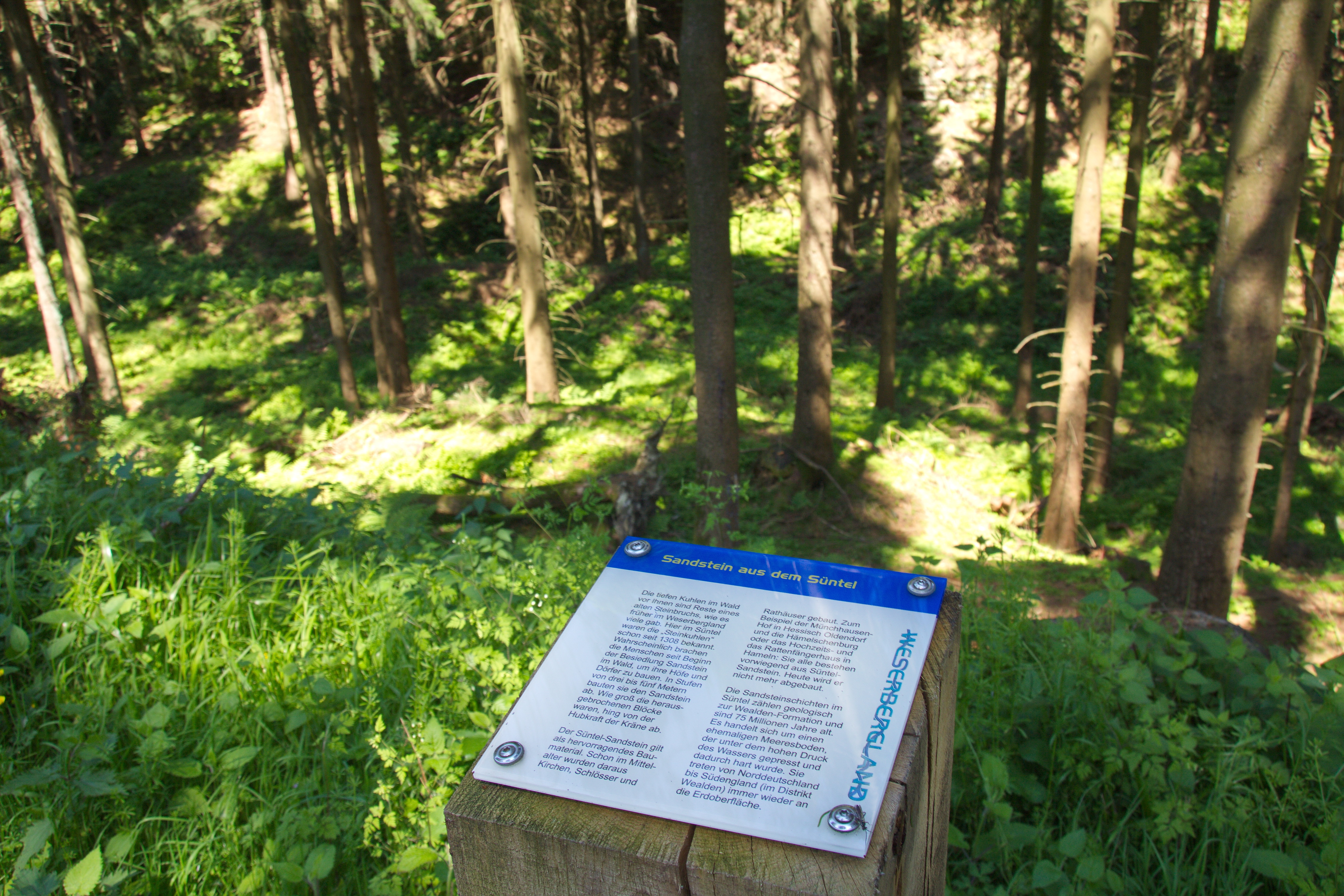 Landschaftsschutzgebiet Süntel, Niedersachsen, Deutschland